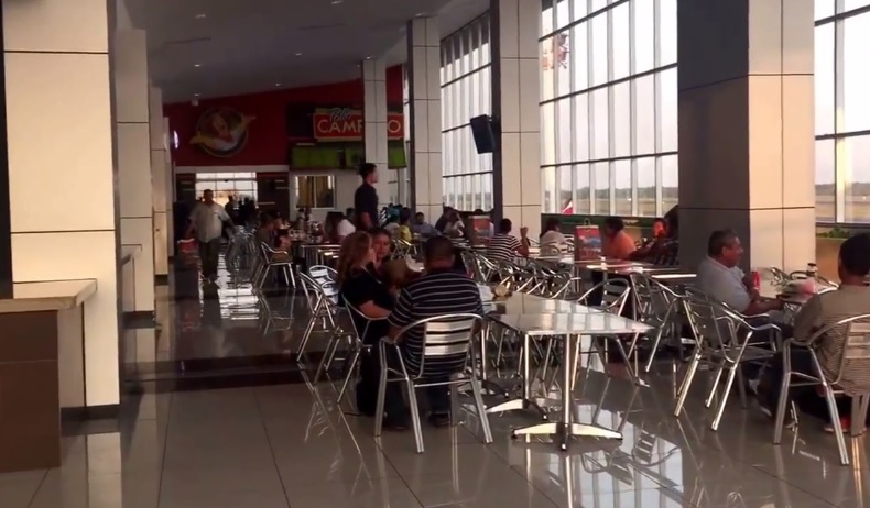 Food Court en tercer nivel de la terminal de pasajeros.